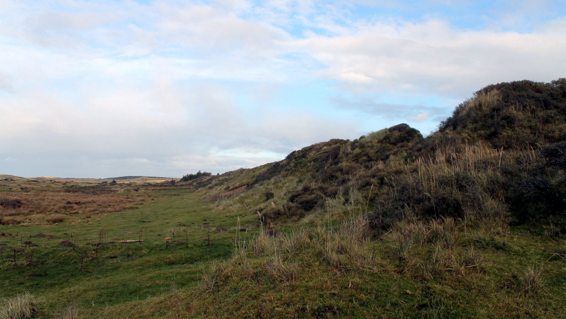 Lien (Skallerup)